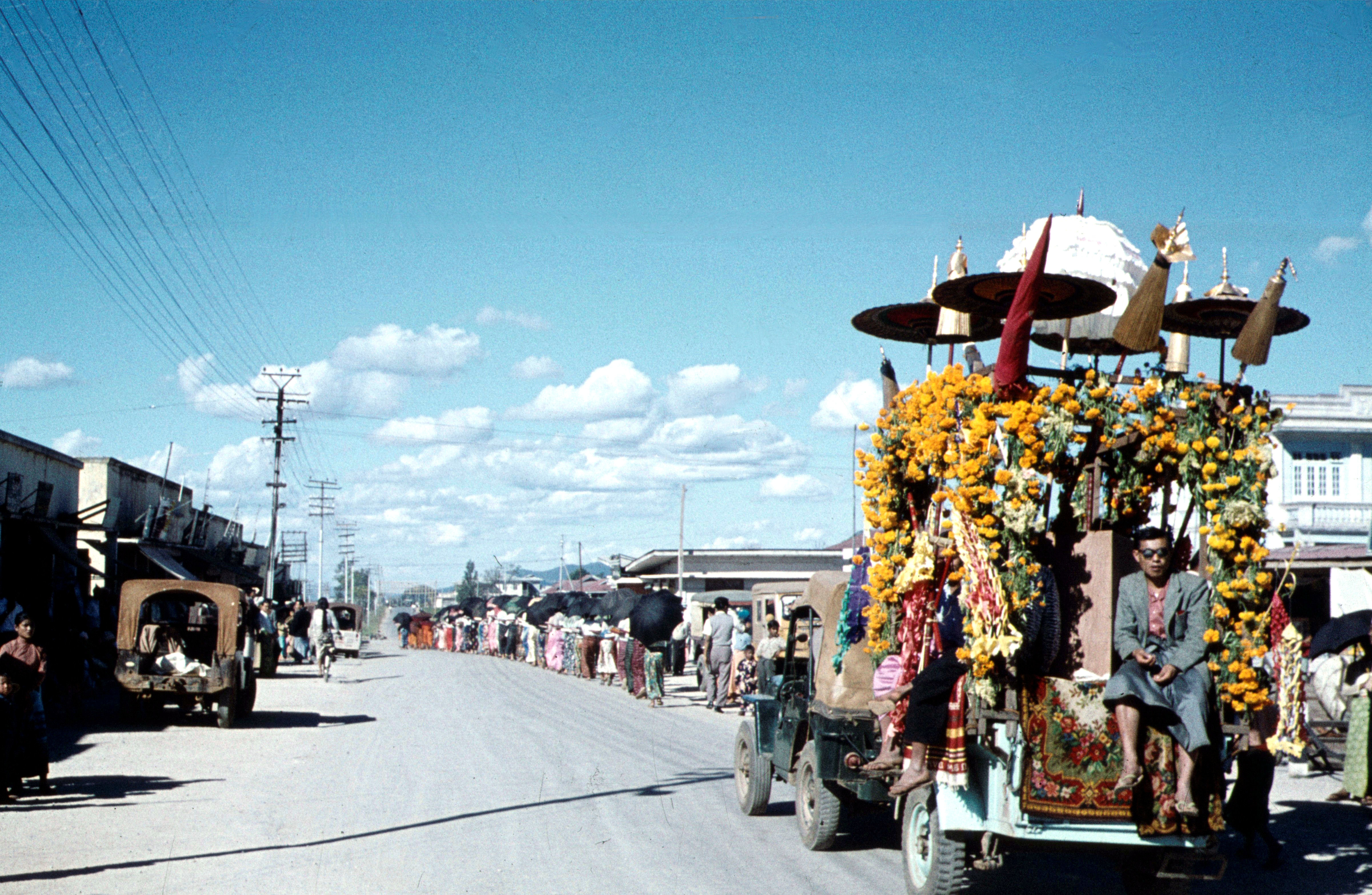 Taunggyi Festival